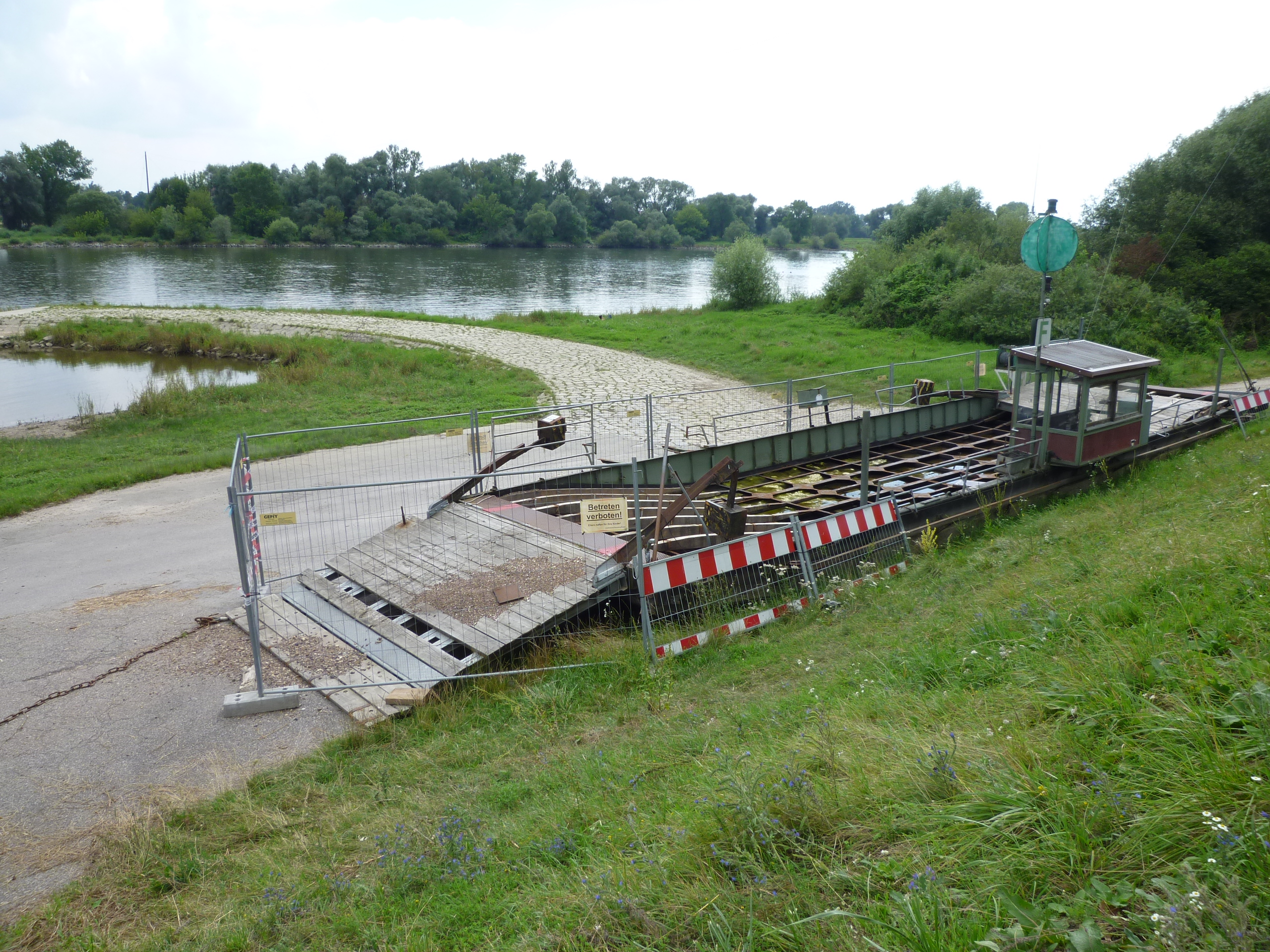 Die am 19.04.2016 verunglückte Donaufähre (Baujahr 1927) ist derzeit am Donau-Ufer in Mariaposching abgelegt. Die Fährverbindung zwischen Mariaposching und Stephansposching soll mit einer neuen Fähre wieder aufgenommen werden.